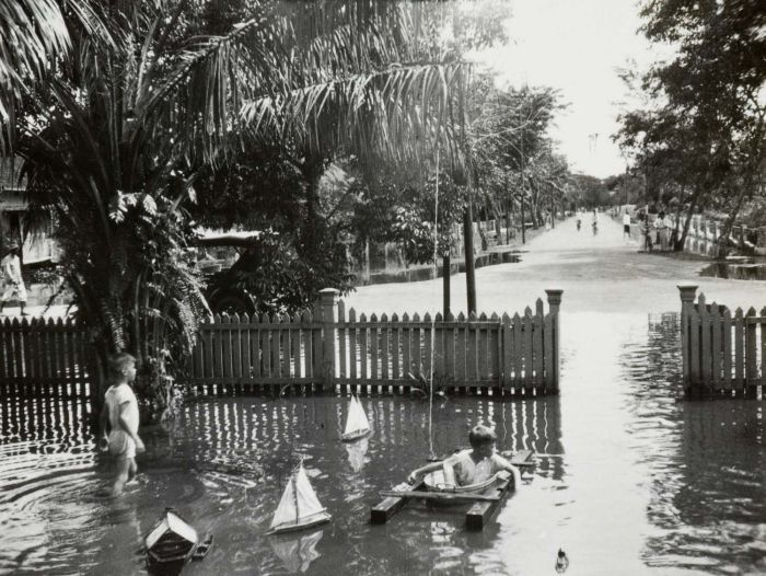 Foto. De broers Henk en Hans Japing spelen in de tijdens hoog water ondergelopen tuin van het huis met nummer 34 op de Boekit Ketjil in Palembang